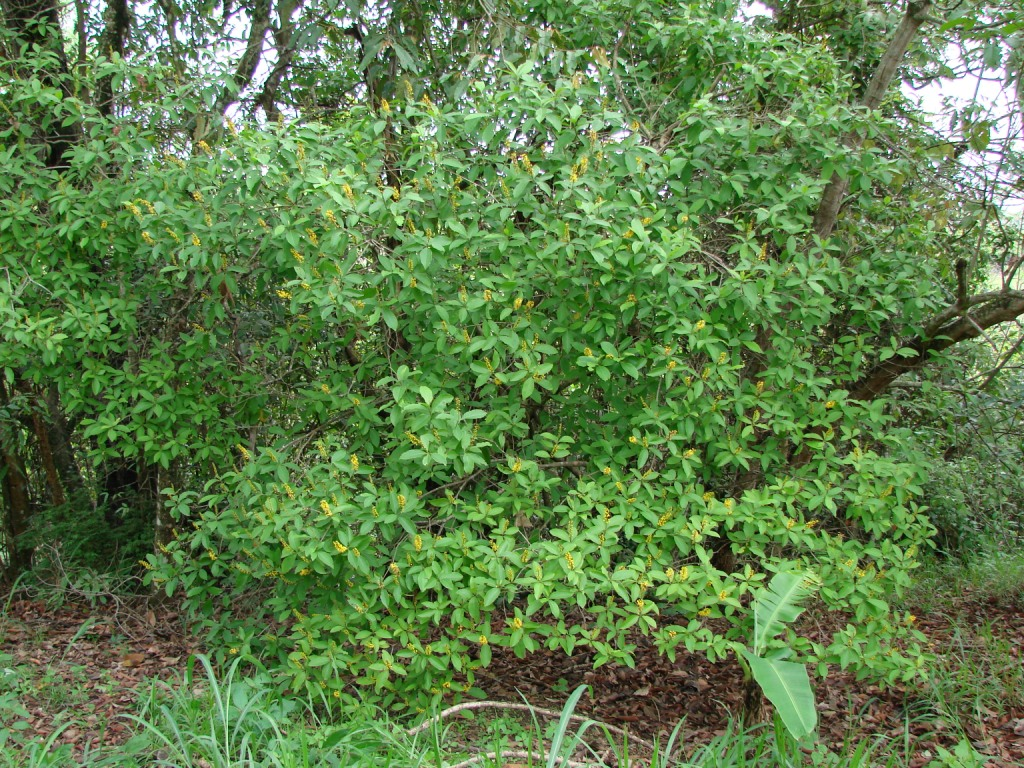 Byrsonima laxiflora - MALPIGHIACEAE Parque Estadual da Serra dos Pirineus - Pirenópolis - Goiás - Brasil.